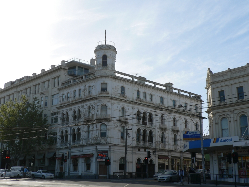 The George Hotel, St Kilda